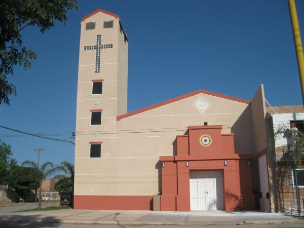 Taco Pozo, en Departamento de Almirante Brown, Provincia del Chaco, Argentina. Parroquia Santa Rosa de Lima.